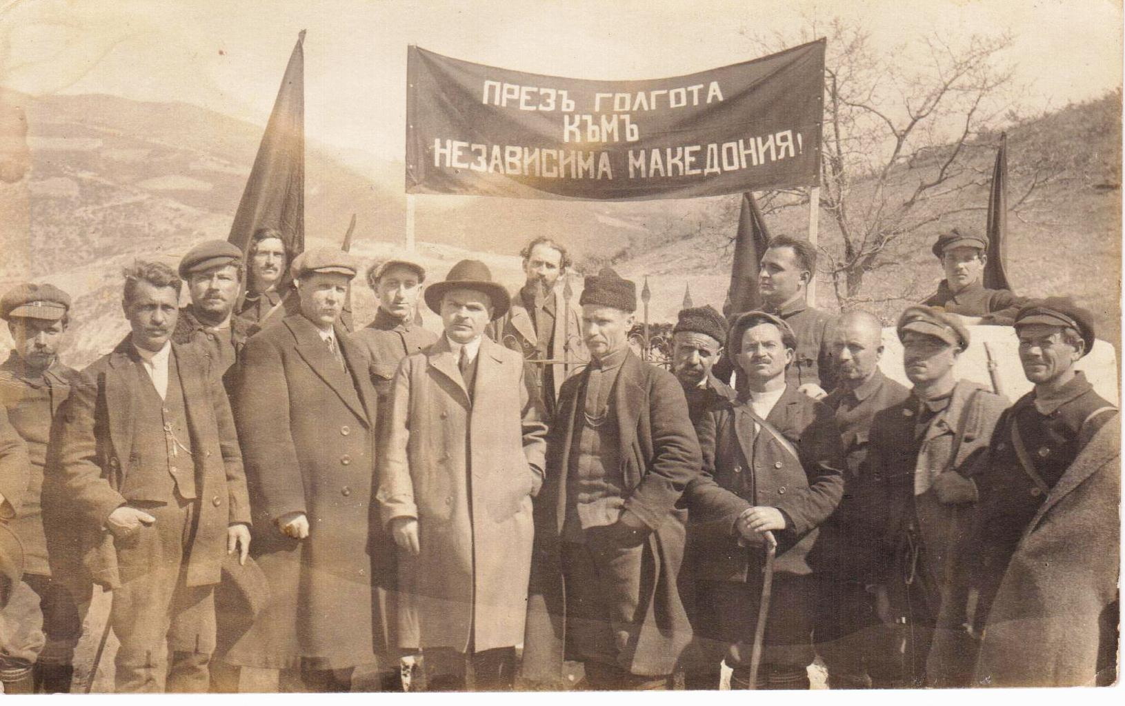 Снимката е от гроба на Тодор Александров, заедно със Струмишкия войвода Вънде